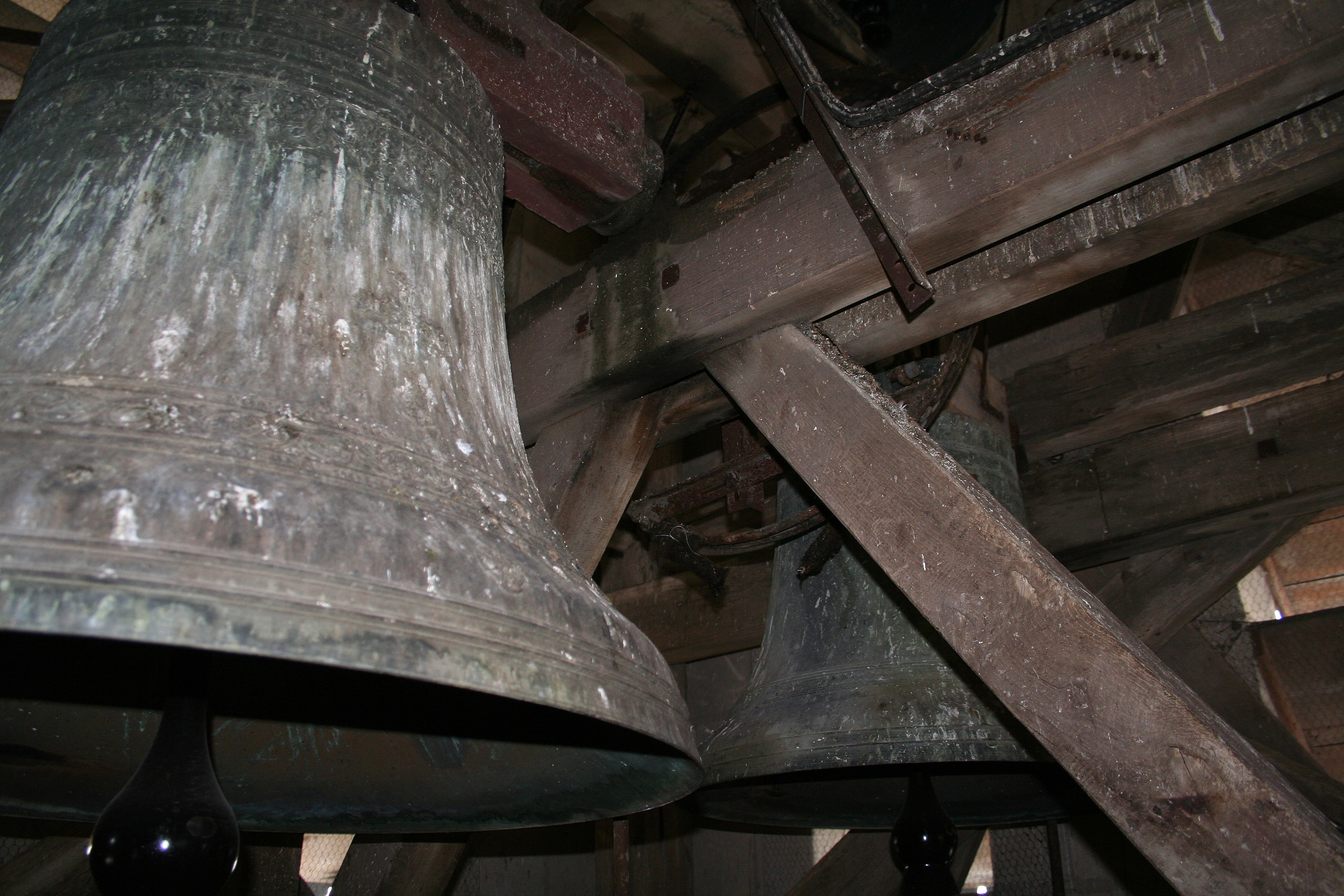 Après être monté par une échelle en bois, accès à la flèche de l'église de Chemellier (Maine-et-Loire, France) avec vue sur les cloches.